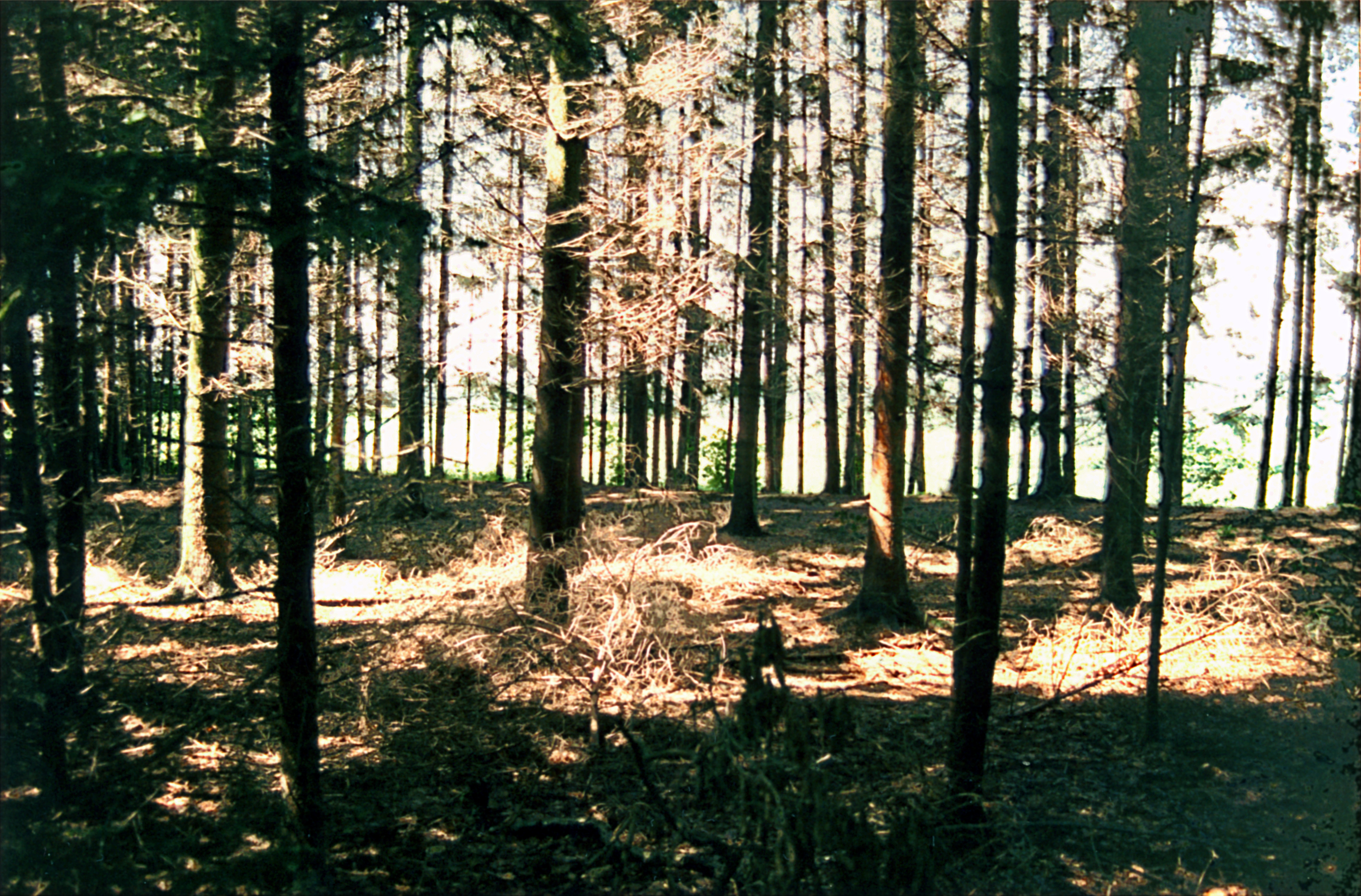 Der guterhaltene Limeswall bei Wp 12/46, nordwestlich von Unterböbingen. Zustand im Juni 1993.